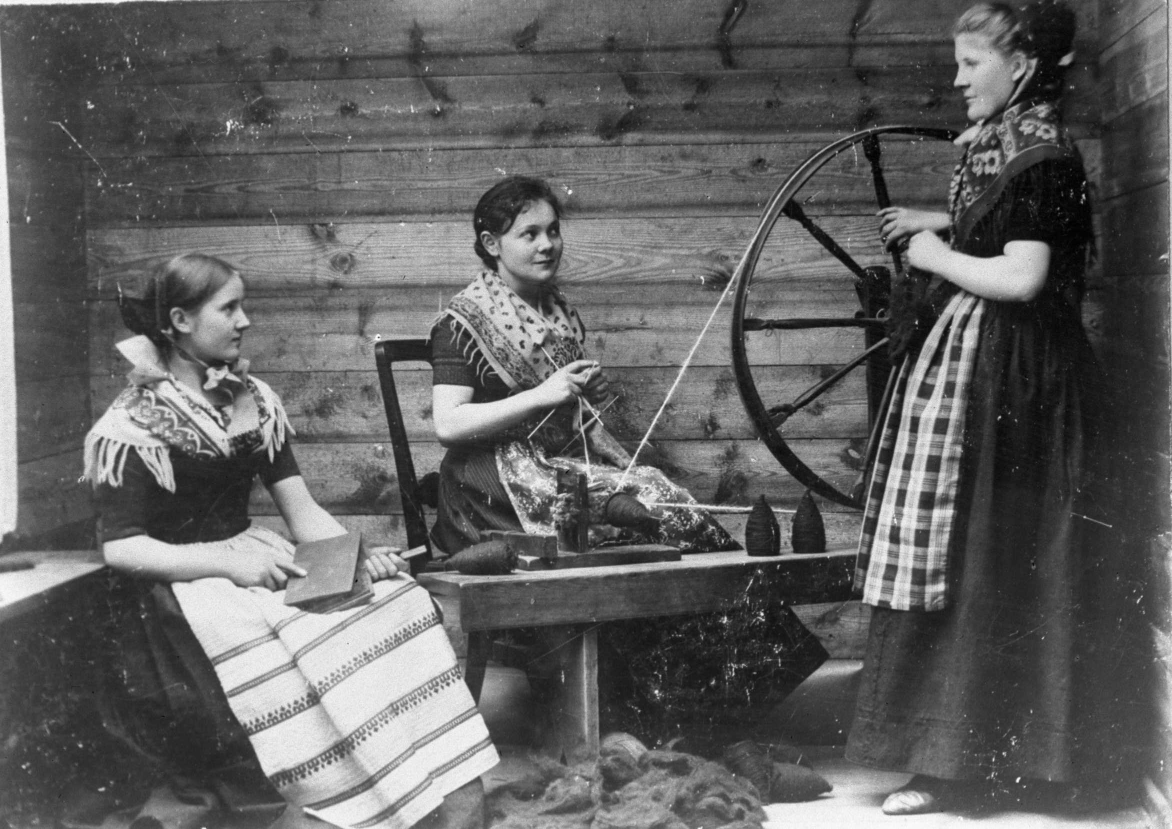 Kvinner spinner og karver ull på Færøyene.